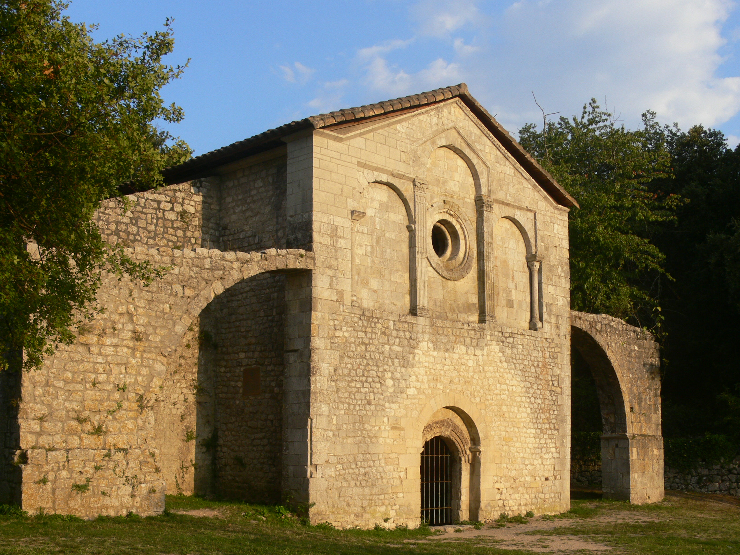 Prieuré du Val des Nymphes